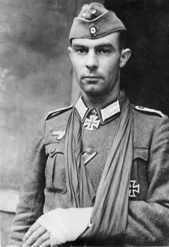 Walter Ohmsen Ritterkreuzträger Obltn. (MA) Walter Ohmsen, Batt.Chef der Marineküsten-Batt. "Marcouf", erhielt das Ritterkreuz im August 1944 Oberleutnant Walter Ohmsen mit Ritterkreuz (Porträt), Verwundung am linken Arm (in Schlinge)] Abgebildete Personen: Ohmsen, Walter: Oberleutnant, Ritterkreuz (RK), Marine, Deutschland Information added by Wikimedia users.